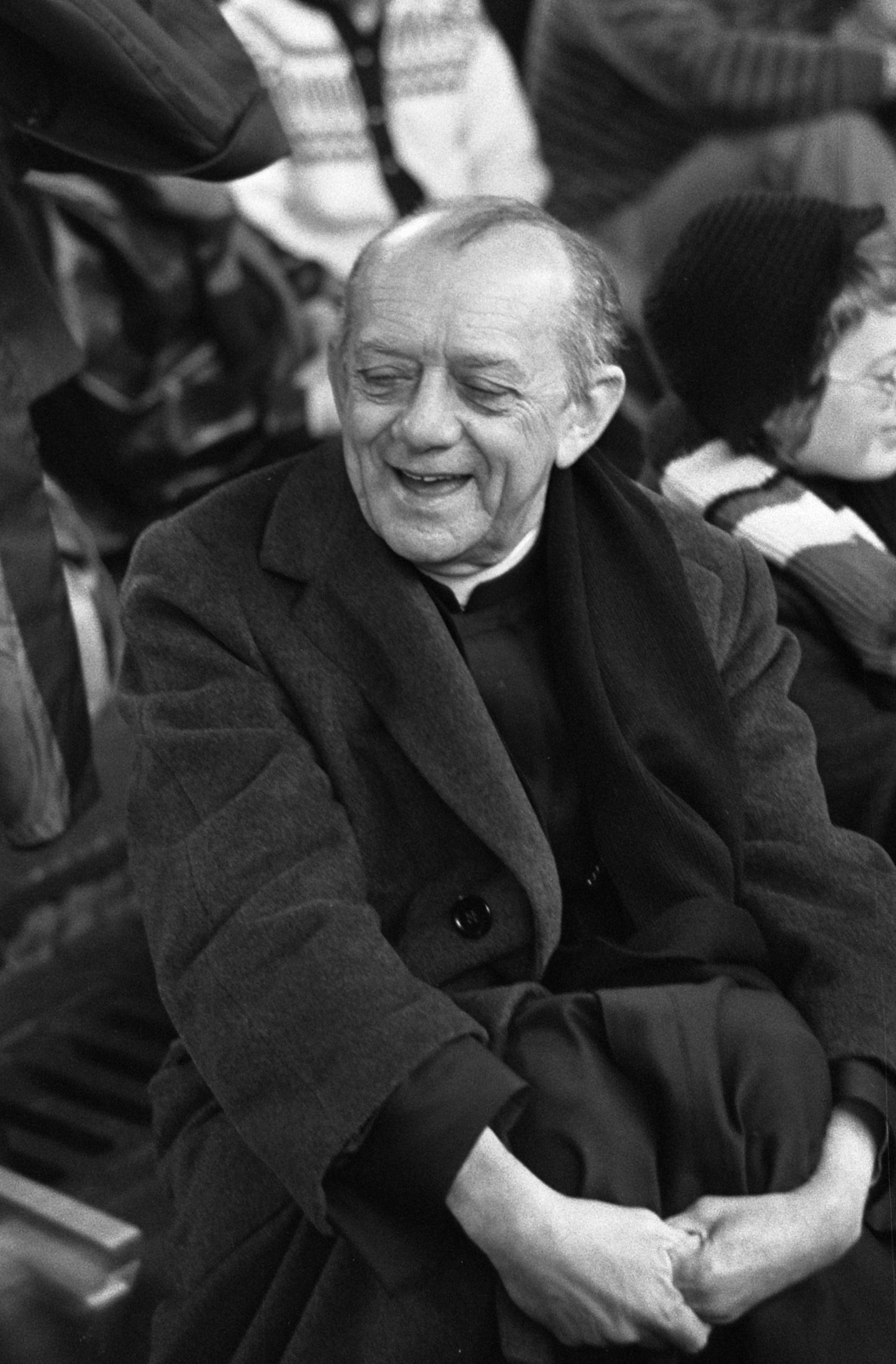 Braziliaanse bisschop Don Helder Camara bij eucharistieviering in Den Bosch ; Don Helder Camara tijdens de bijeenkomst